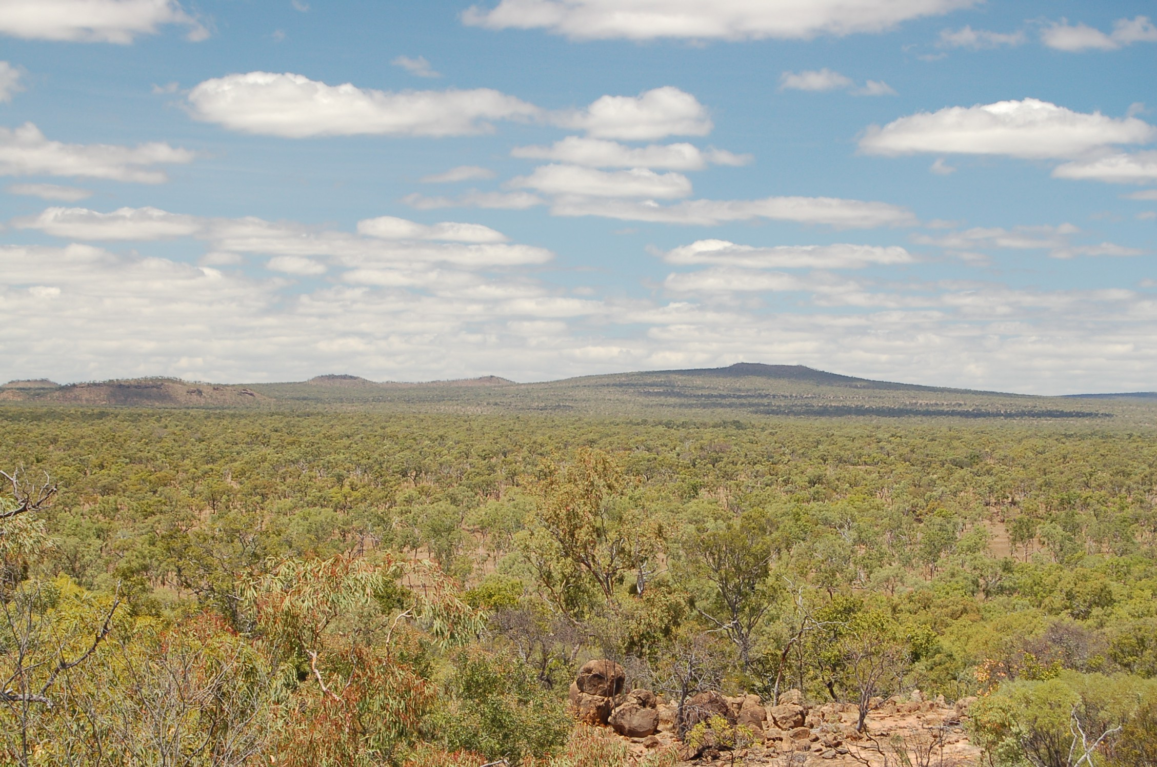 Aussicht im Undara-Nationalpark, Queensland